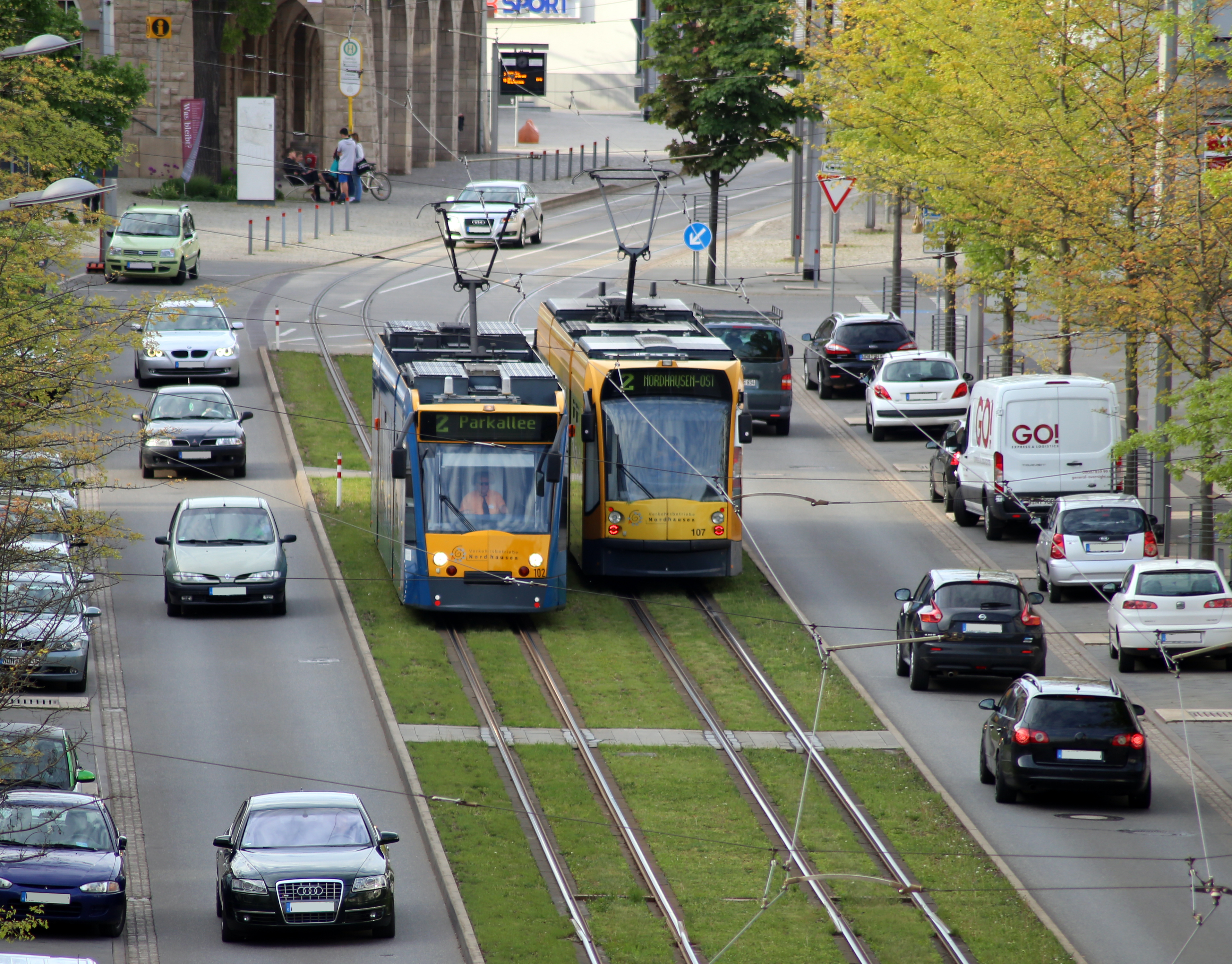 Zwei Siemens Combino (102 und 107) in der Rautenstraße in Nordhausen (Thüringen)